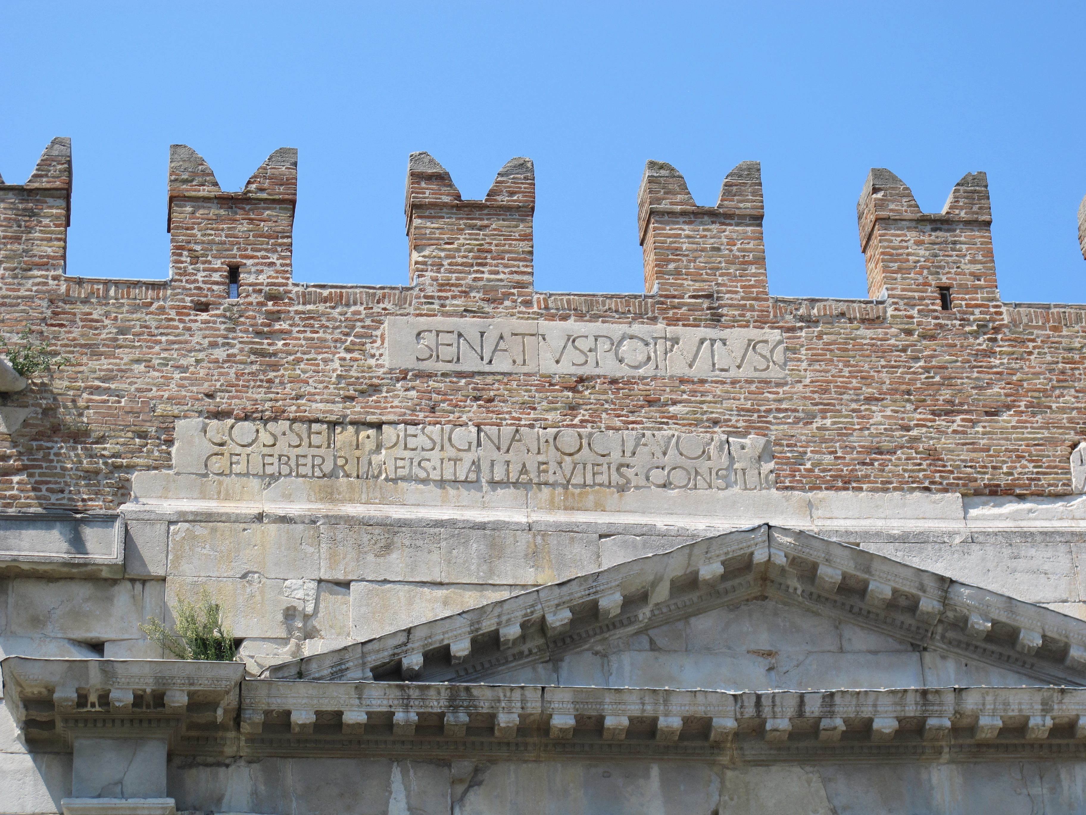 Arco di Augusto - MIBAC This is a photo of a monument which is part of cultural heritage of Italy.